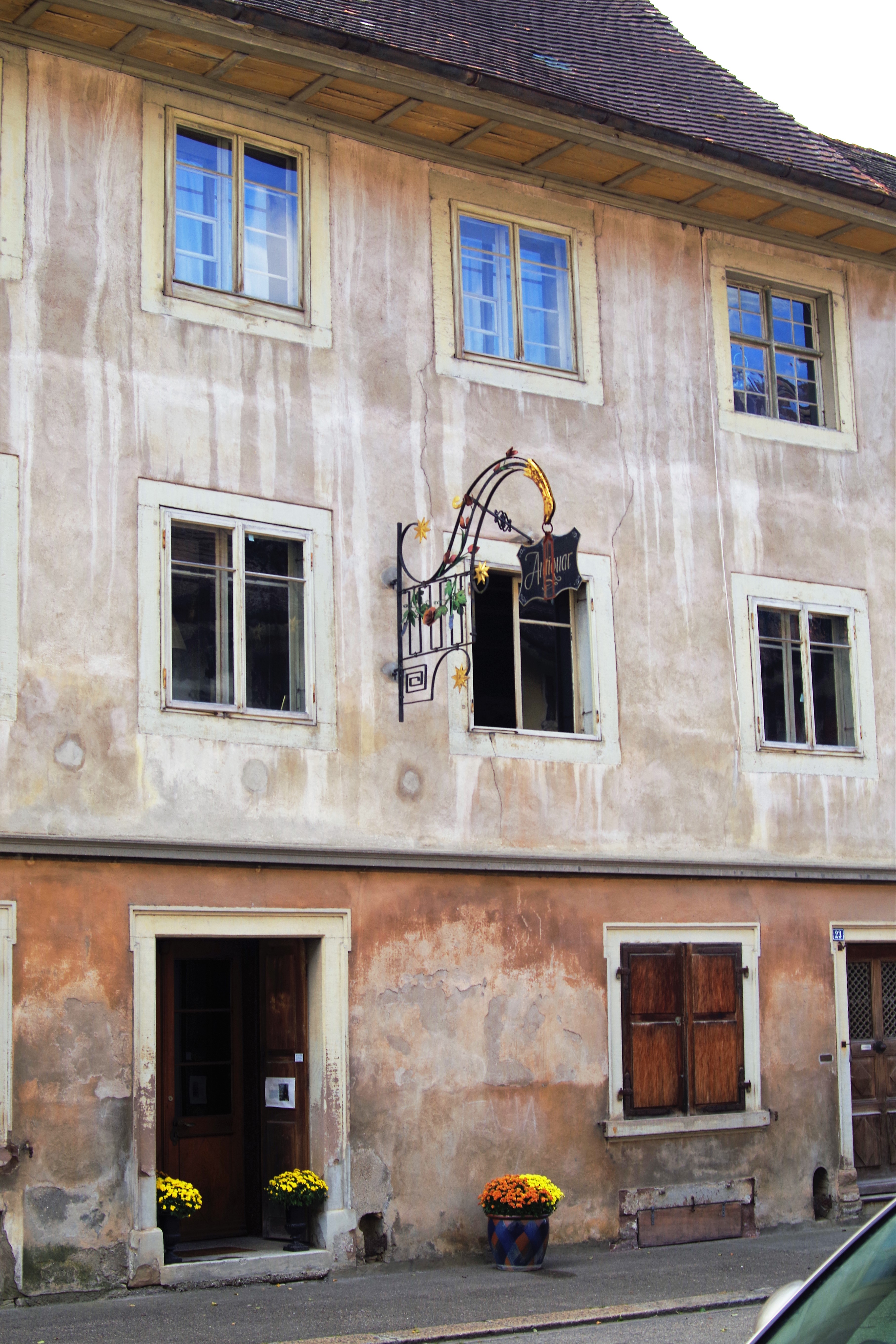 Neunkirch im Klettgau, Antiquariat (ehem. Hans Soller)